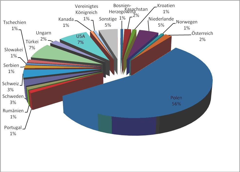 Gesamtübersicht aller eingehenden Gesuche